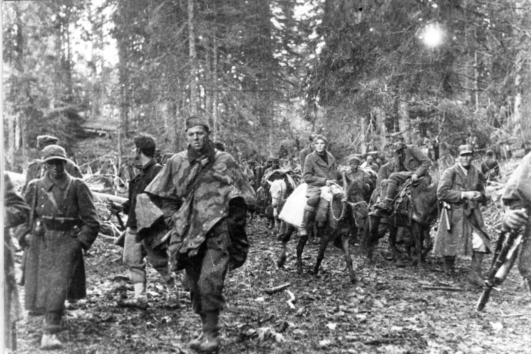 Srpskohrvatski / српскохрватски: Druga proleterska divizija u pokretu kroz Zelengoru, tokom bitke na Sutjesci juna 1943.